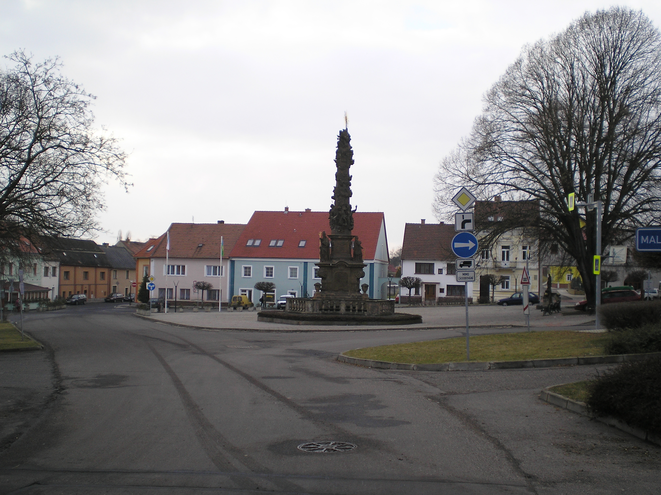 Morový sloup na Náměstí Svobody v Hoštce